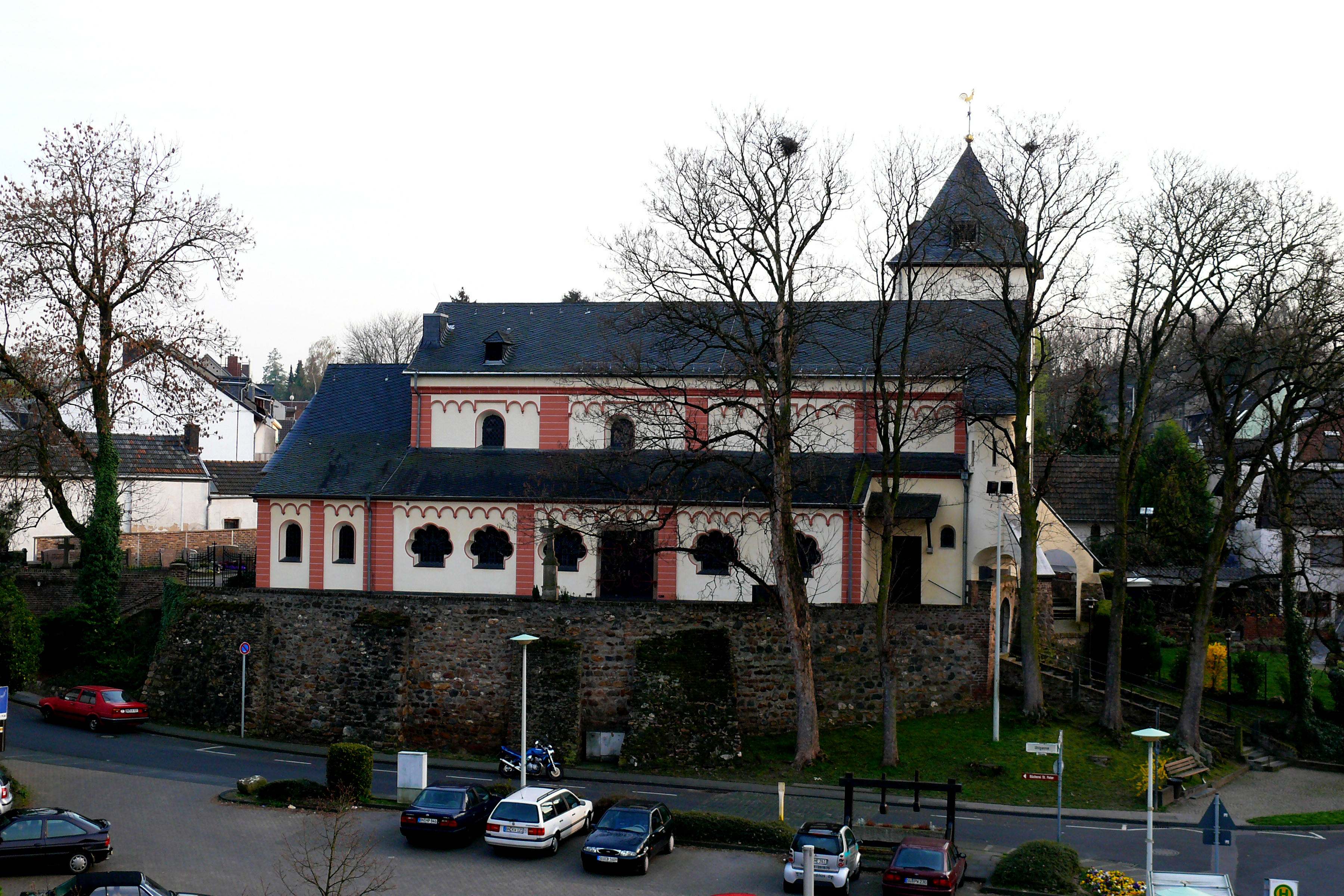 katholische Pfarrkirche St. Peter in Lengsdorf, Ansicht von Norden